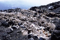 2001年の富士登山の際に携帯電話で撮影した「白い川」と呼ばれる山頂トイレから垂れ流された屎尿まみれのトイレットペーパー 登山道からは外れているが、悪臭が立ち込め、時折乾燥した粉塵が舞い上がり不衛生な状態だった 現在はタンク内分解循環型のエコトイレに改善され、こうした光景は見られなくなった